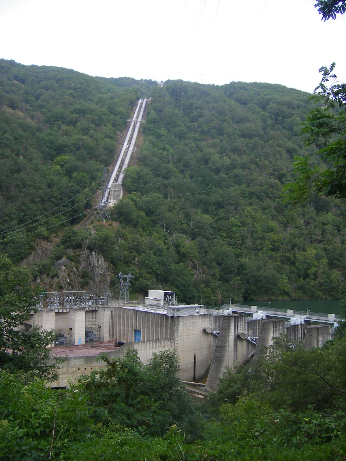 Barrage du Pouget (commune Le Truel - Aveyron)